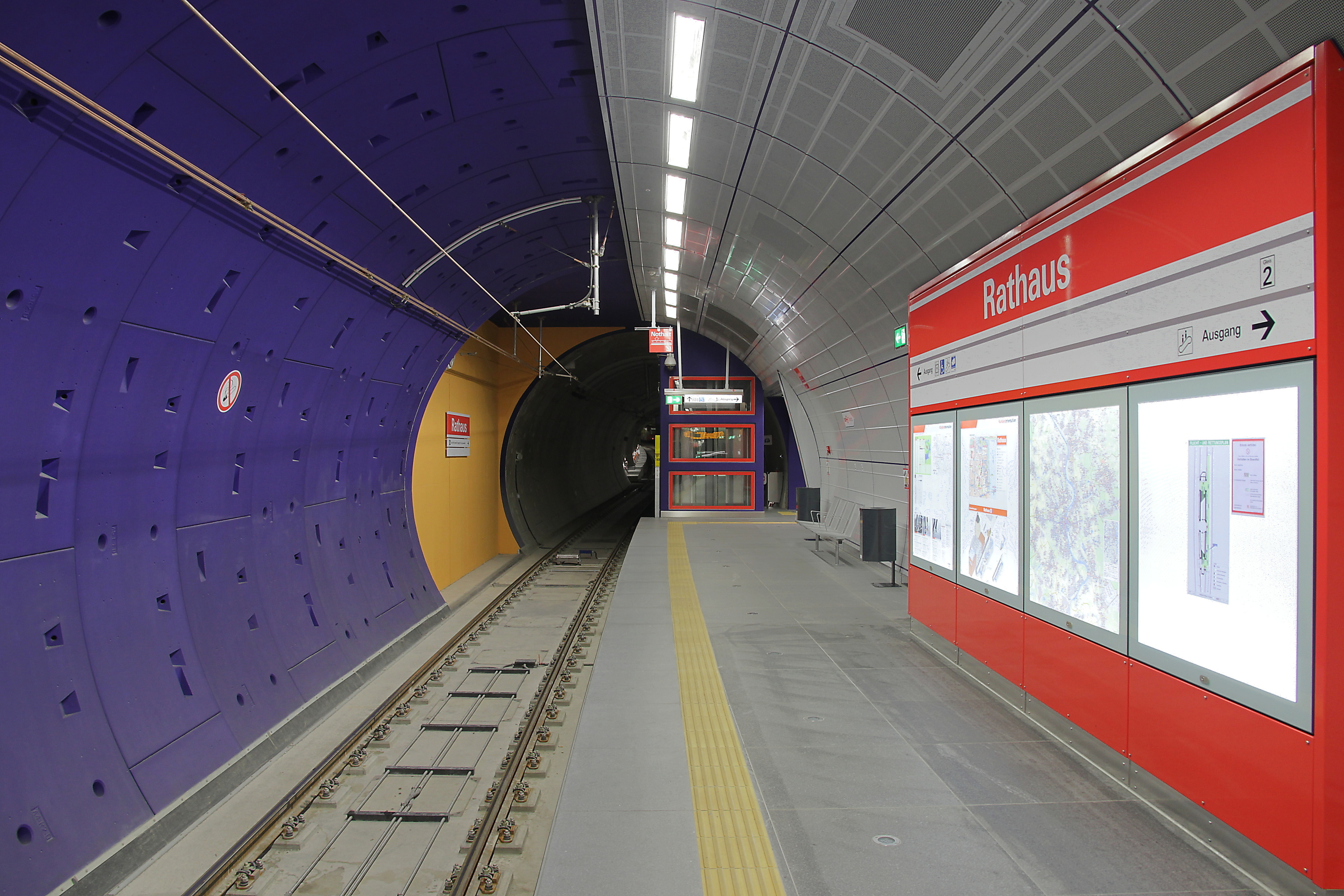 Bahnsteigebene im U-Bahnhof Rathaus in Köln